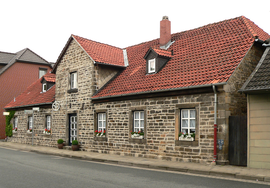 Vorsfelde, Oberes Tor, ehemaliges Armenhaus